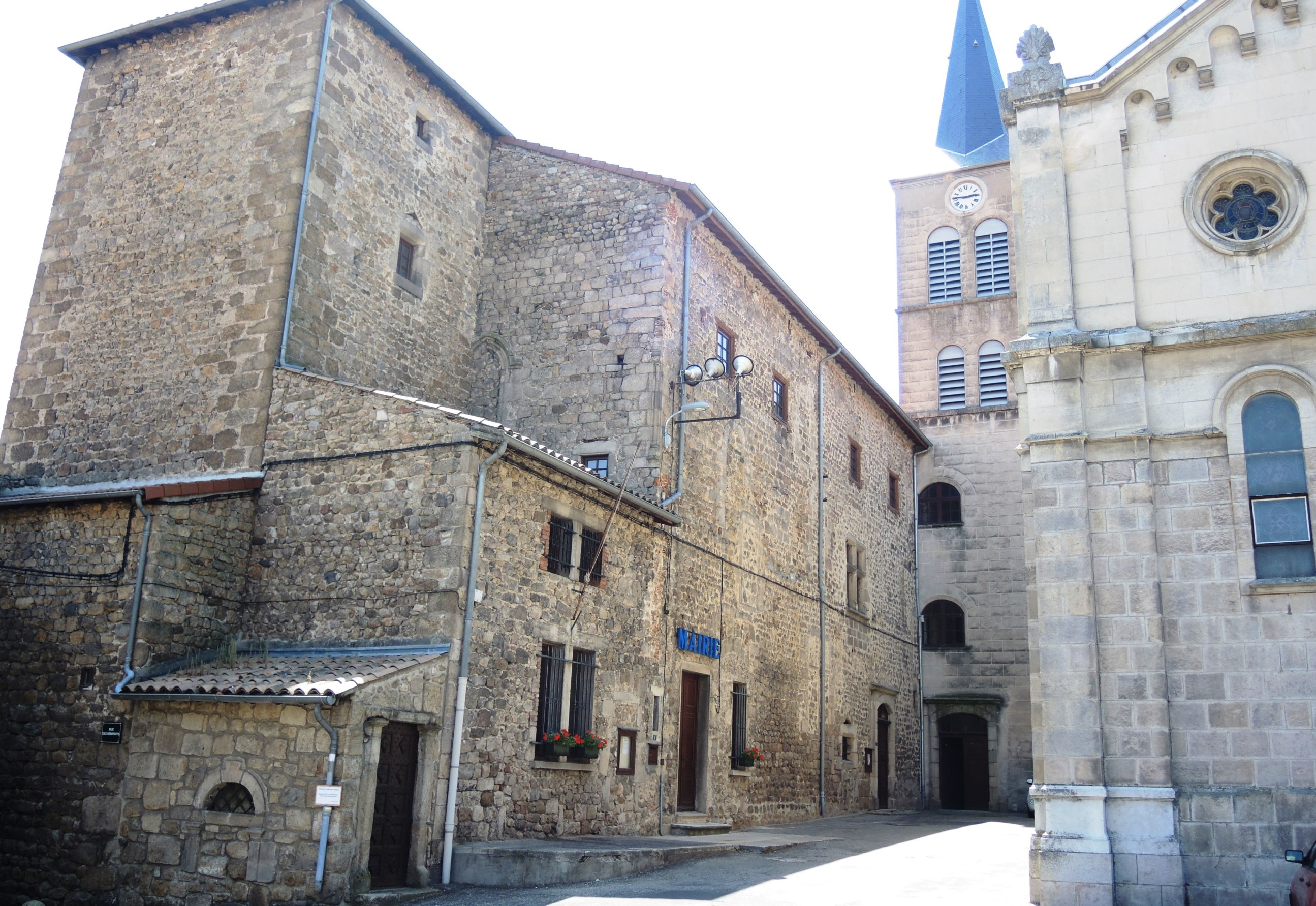 Satillieu château et clocher, con mairie